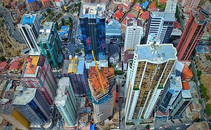 Sopocachi